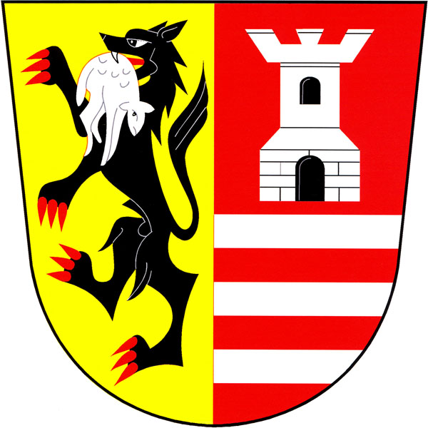 Znak obce Úsilov